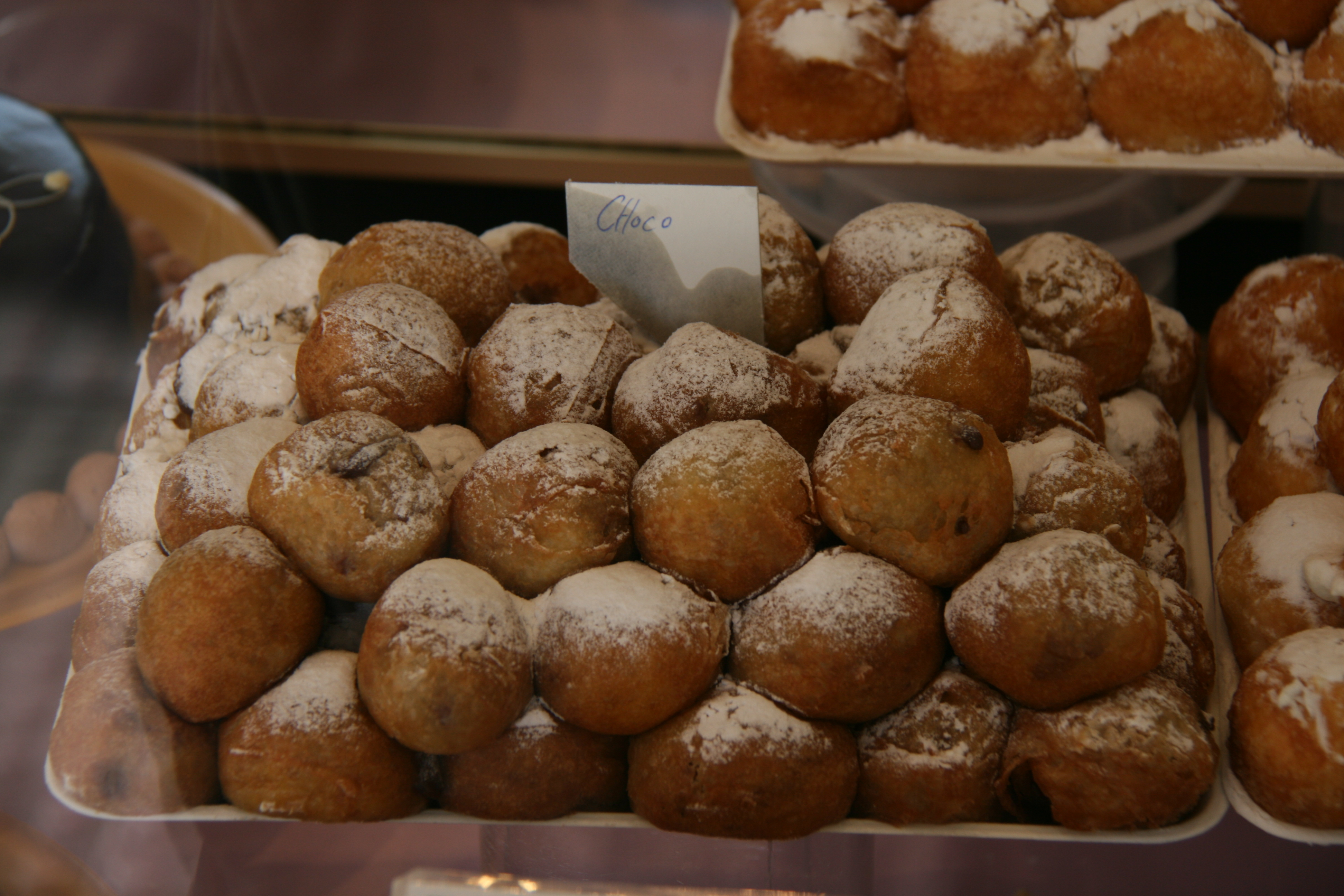 Bueñuelos de chocolate